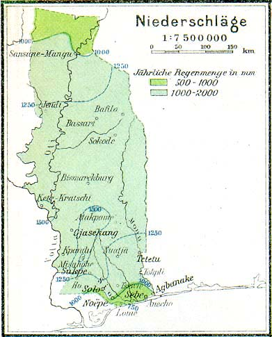 Togo um 1915, Niederschlagsverteilung